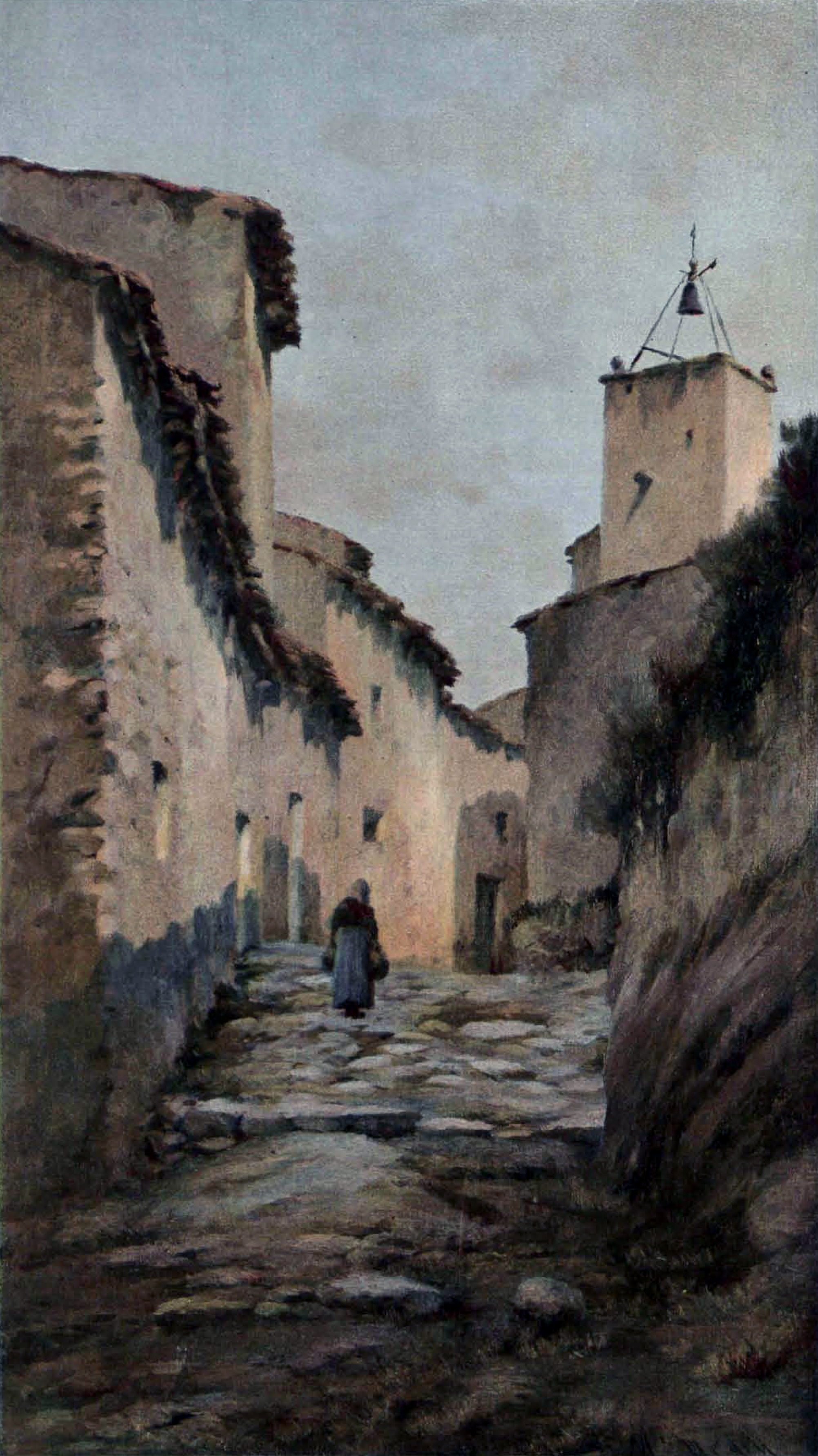 Una calle en Camprodón (Cataluña).